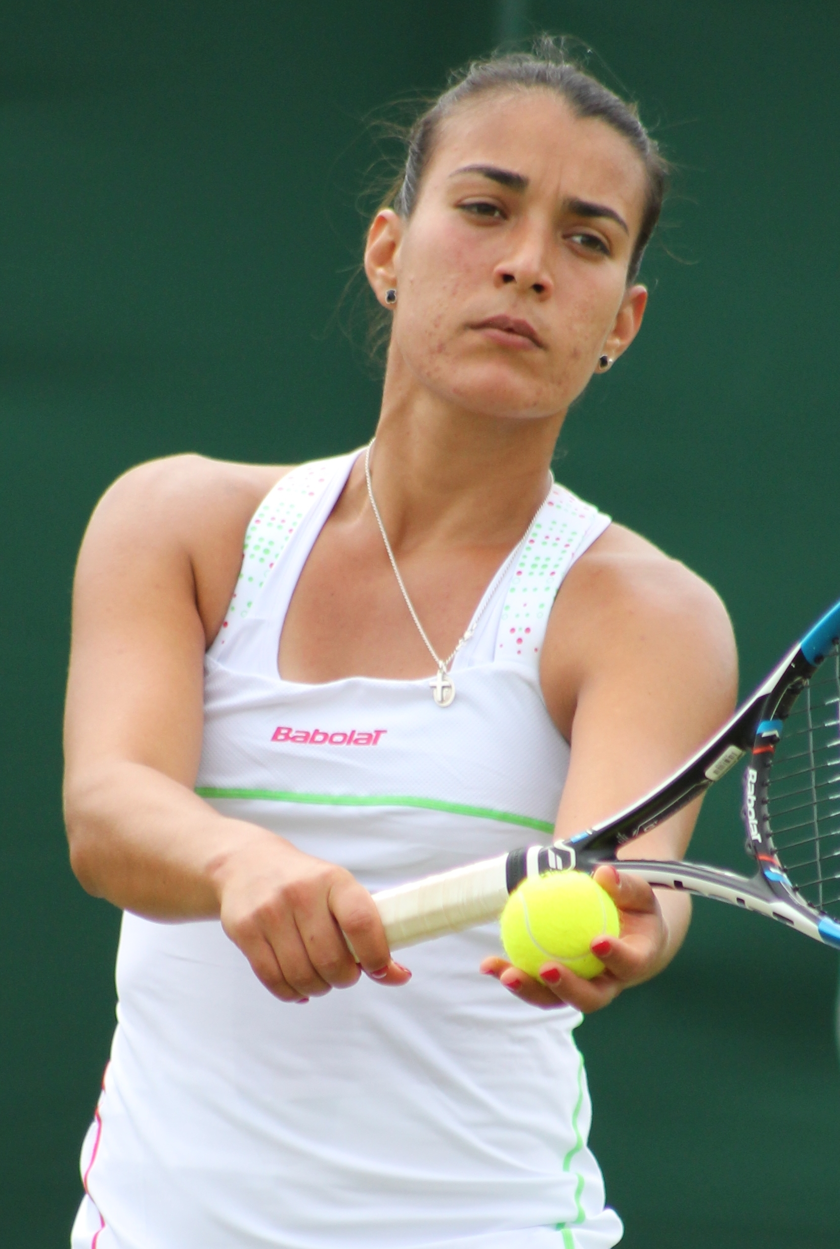 Cepede Royg WMQ15